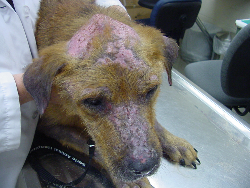 canine pemphigus foliaceus